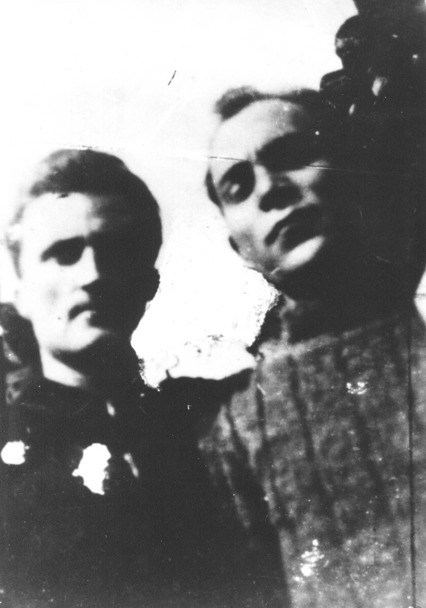 Srpskohrvatski / српскохрватски: Ramiz Sadiku, organizacioni sekretar KPJ na Kosovu, i Boro Vukmirović, politički sekretar, neposredno pred streljanje.